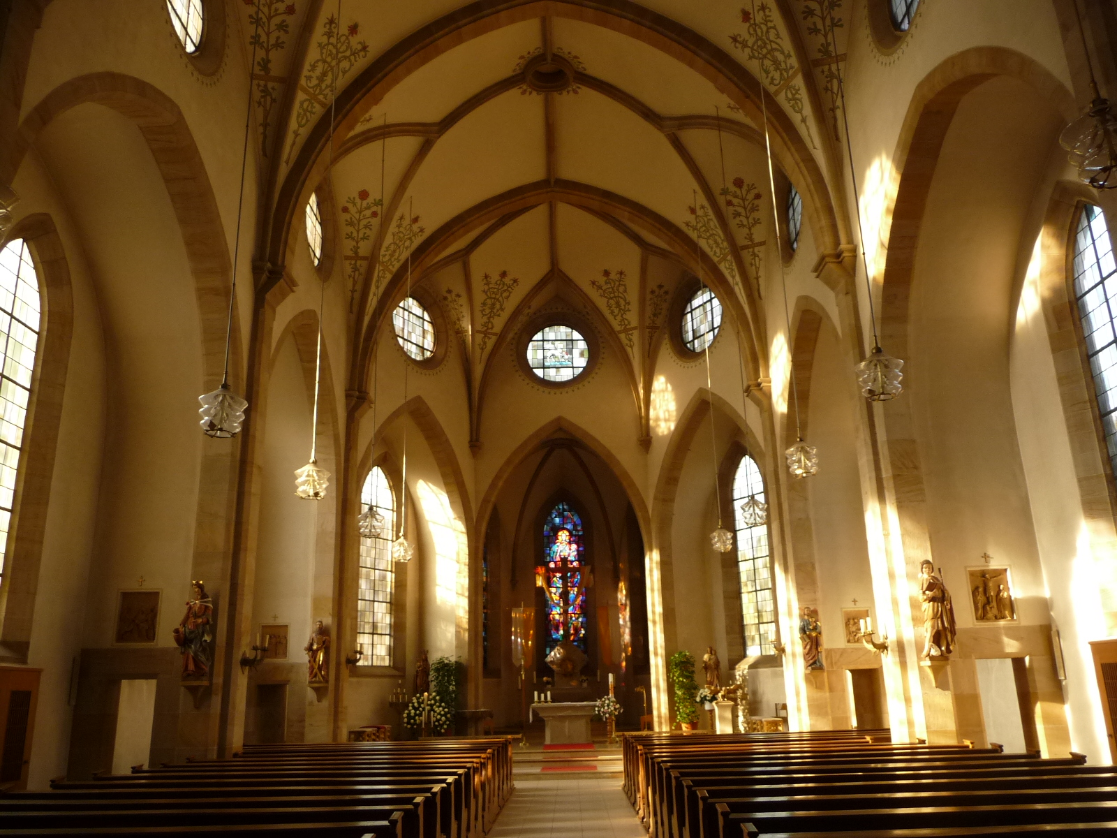 St. Peter und Paul in Geinsheim (Neustadt an der Weinstraße)